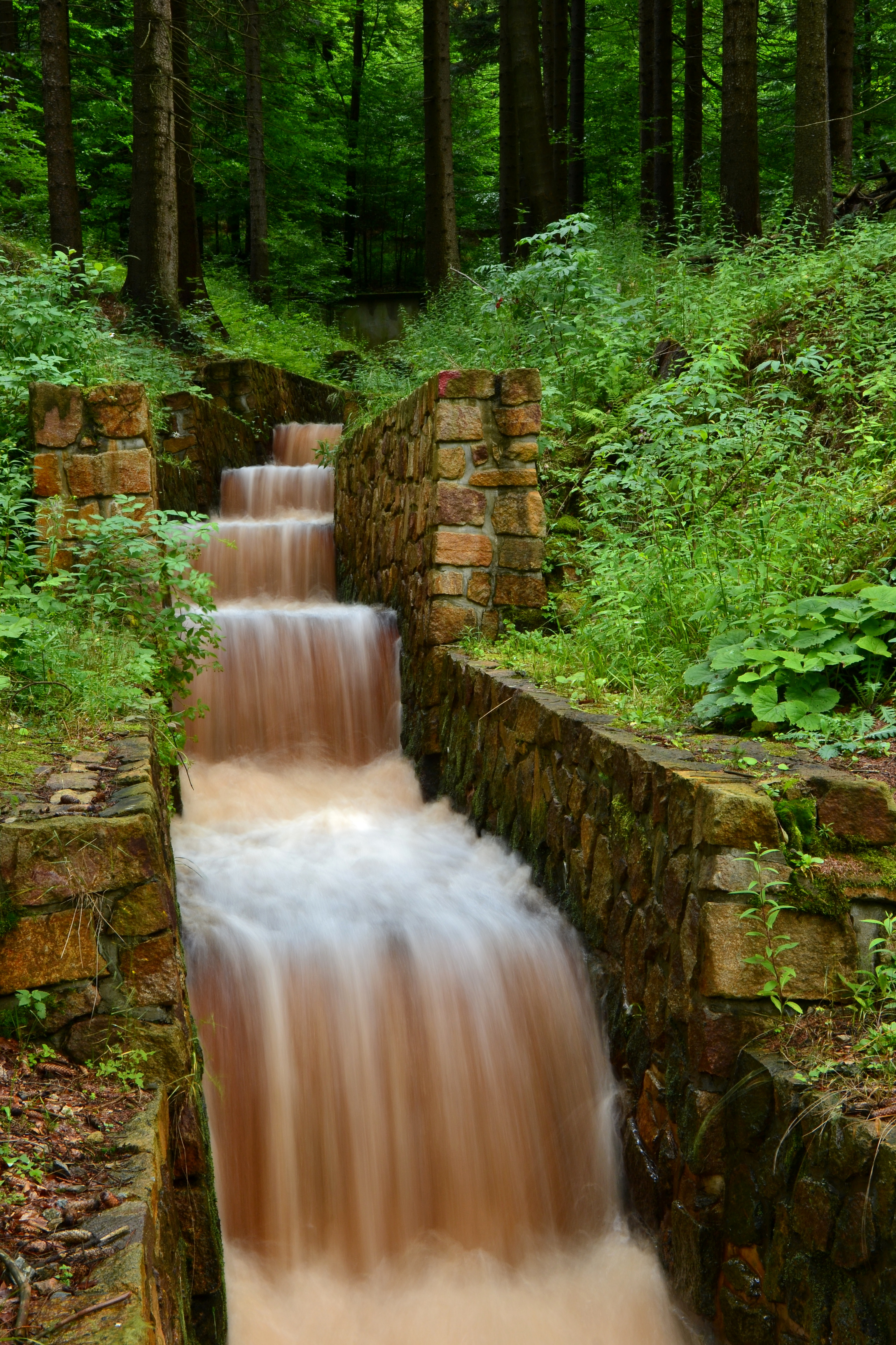 Přírodní park Bezručovo údolí - dolní ústí Dieterovy štoly